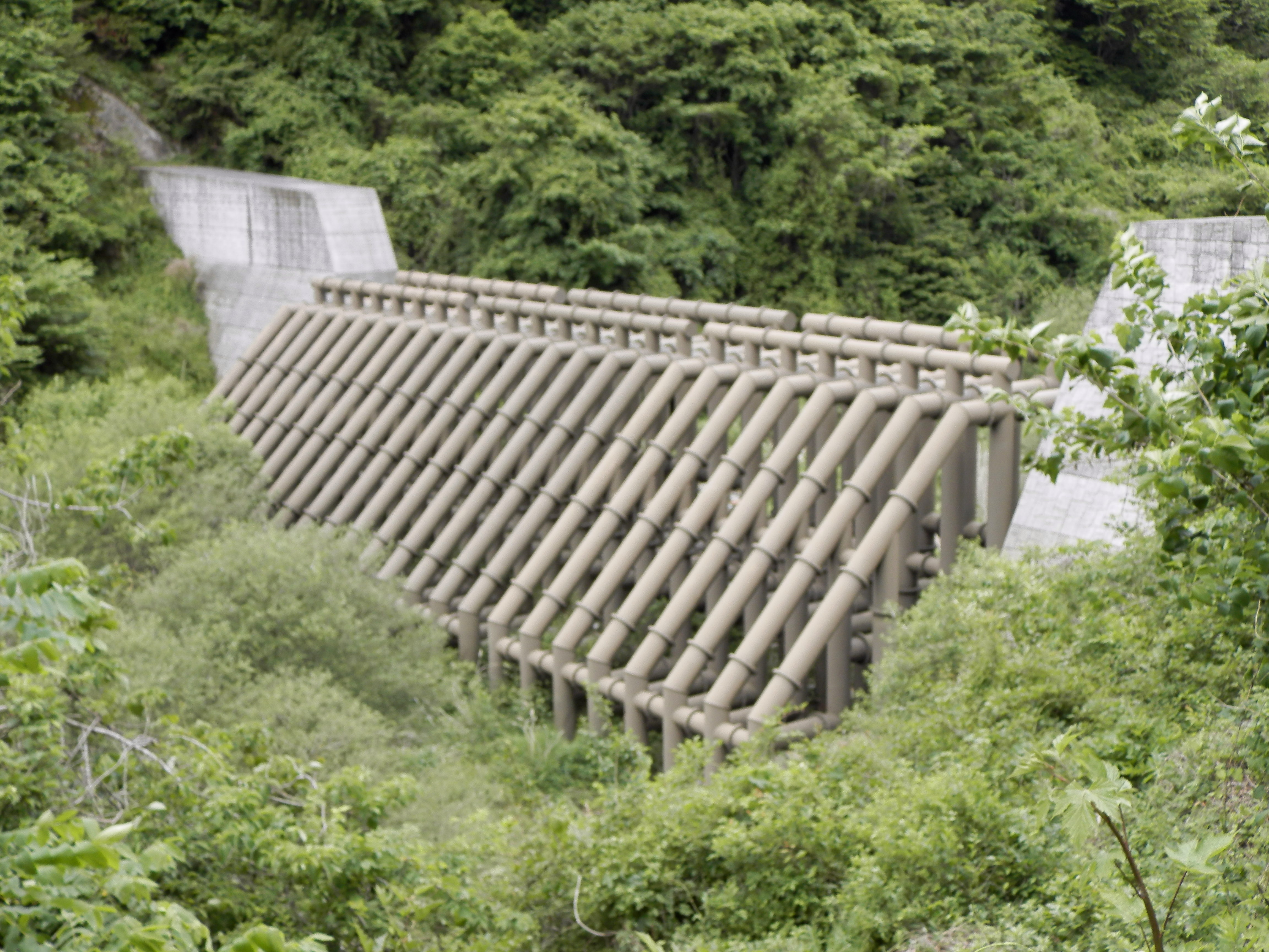 スリット式砂防ダム（長野県上田市神川水系）